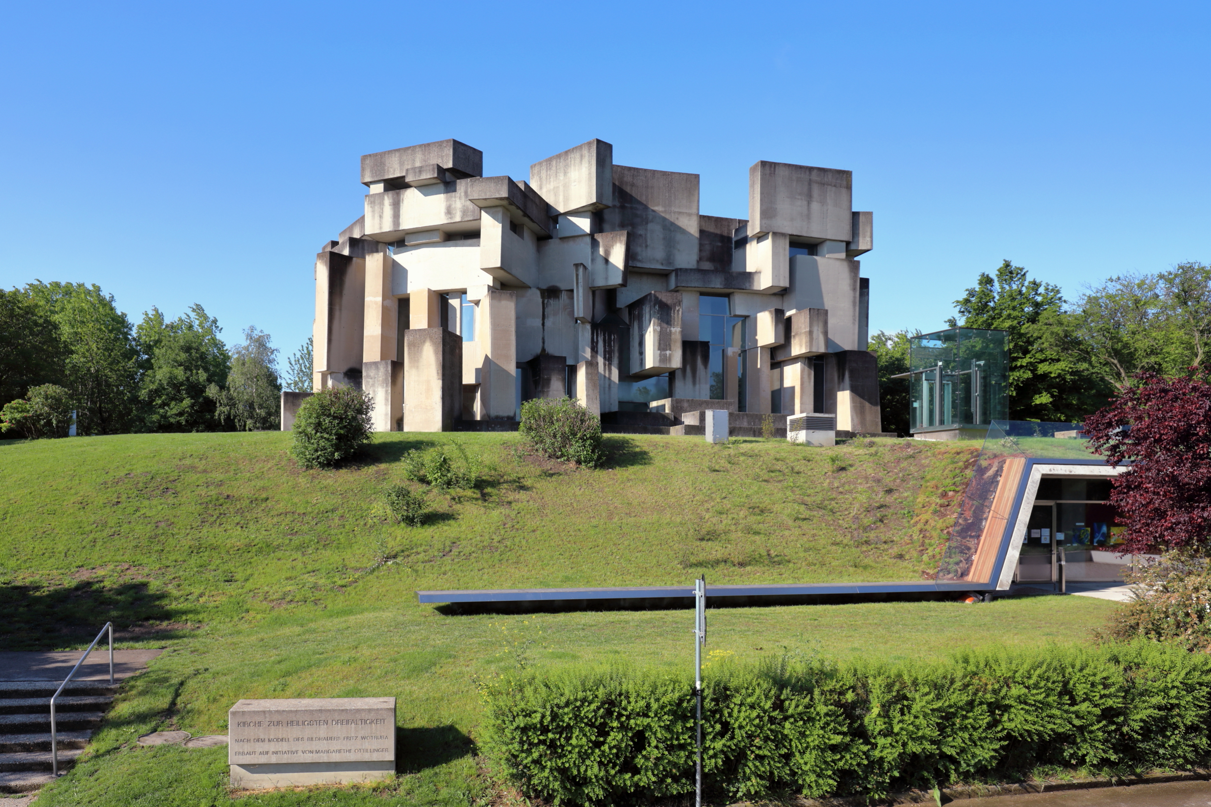 Nordansicht der Wotruba- bzw. Dreifaltigkeitskirche auf dem Georgenberg im Wiener Stadtteil Mauer des 23. Gemeindebezirkes Liesing. Rechts teilweise der Zubau mit dem Lift und links unten der Gedenkstein beim Aufgang.Die Kirche im Stil des Brutalismus wurde auf Initiative von Margarethe Ottillinger (1919–1992) und nach einer Idee des Künstlers Fritz Wotruba (1907–1975) vom Architekten Fritz Gerhard Mayr (* 1931) errichtet. Der Entwurf für die Kirche (152 Betonblöcke mit einen Gesamtgewicht von über 4000 Tonnen, ohne Symmetrie aufeinander geschachtelt, mit schmalen, verschieden hohen Fensteröffnungen) wurde von Wotruba 1964 präsentiert. Wegen großem Widerstand konnte man erst 1974 mit dem Bau beginnen und zwei Jahre später, am 24. Oktober 1976, erfolgte die feierliche Einweihung durch Kardinal Franz König.2018/19 wurde nach Plänen des Architekturbüro formann 2 puschmann (Christian Formann, Stefan Puschmann) ein Zubau, der lange umstritten war, um rd. eine Million errichtet. Dieser Zubau, der größtenteils im Hügel hineingebaut wurde, der die Kirche Fritz Wotrubas inszeniert, hindert die ursprünglichen Sichtbeziehungen zur Oberkirche nur gering und ermöglicht durch den Lift einen barrierefreien Zugang zur Ober- und Unterkirche.